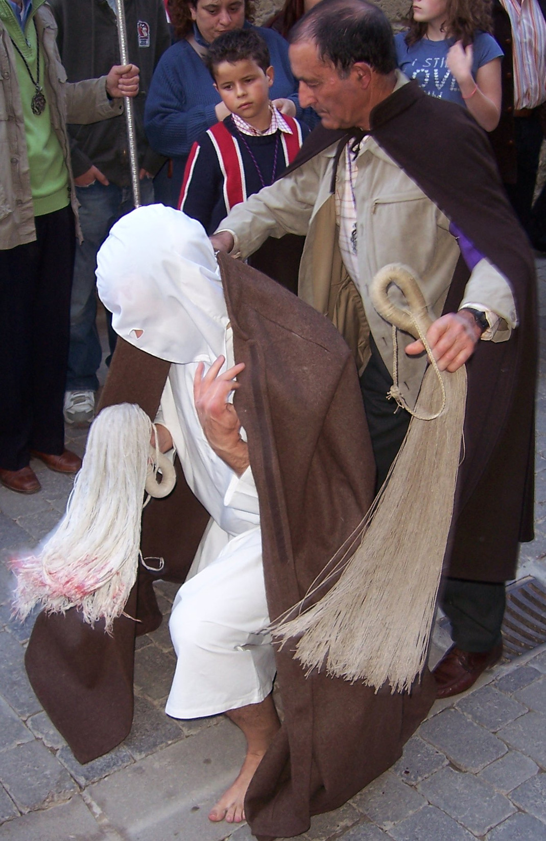 Disciplinante tras finalizar. San Vicente de la Sonsierra. La Rioja (España)